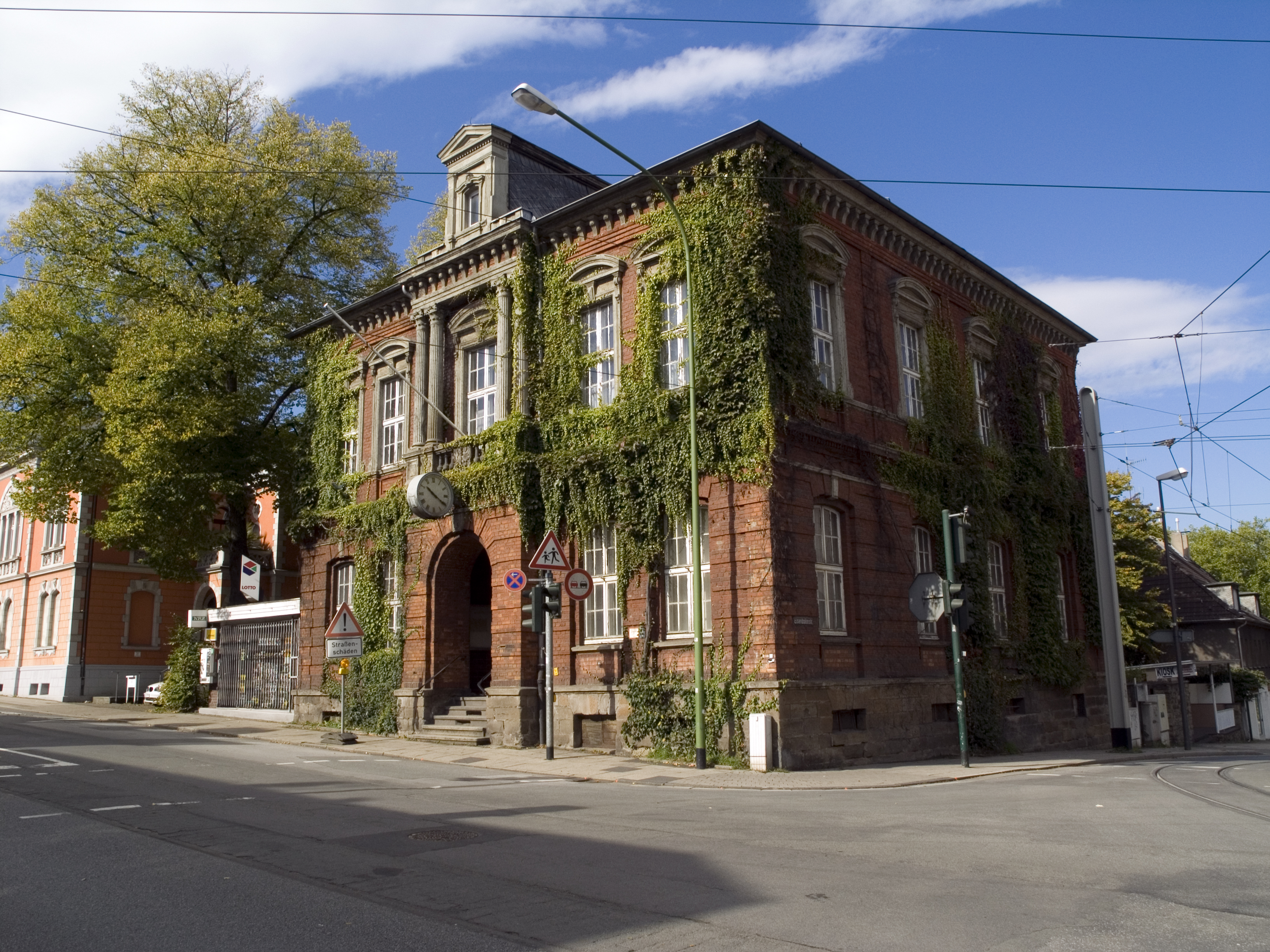 Северный Рейн - Вестфалия, Эссен - hfneif Htkkbyu[feptyf]